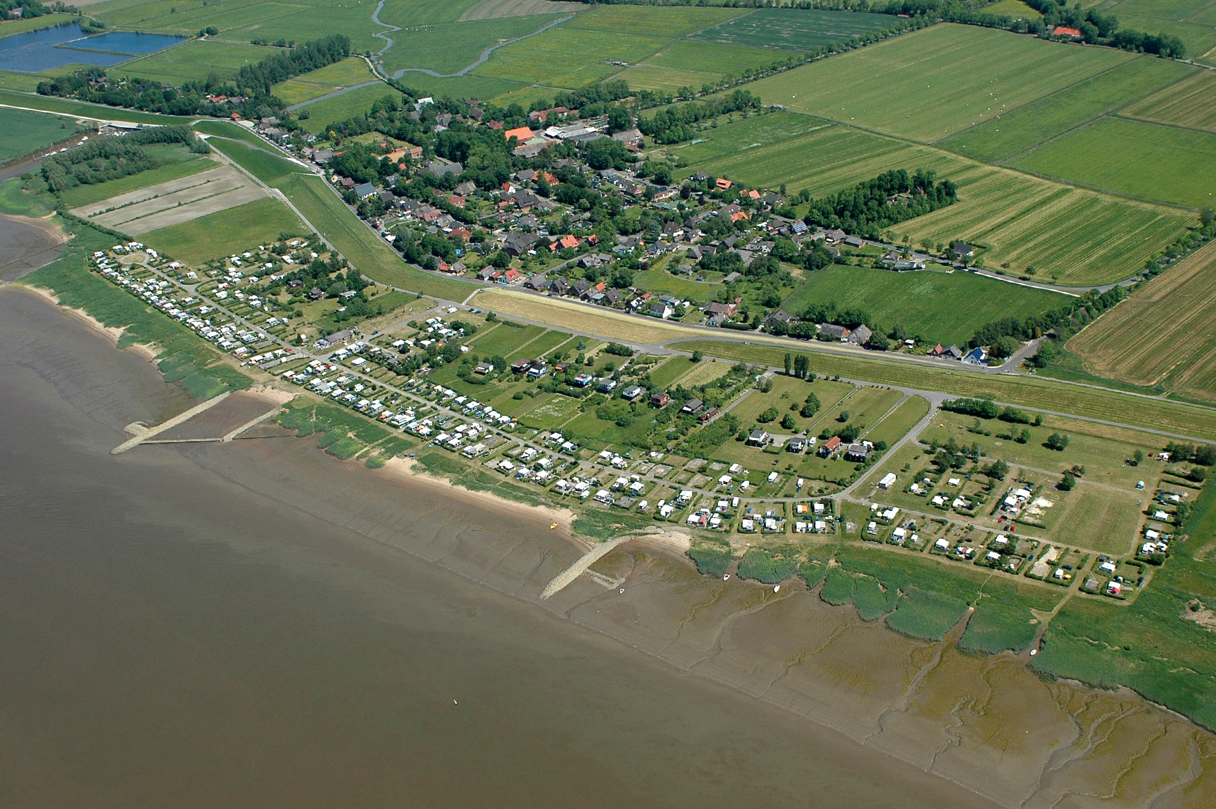 Fotoflug vom Flugplatz Nordholz-Spieka über Cuxhaven und Wilhelmshaven